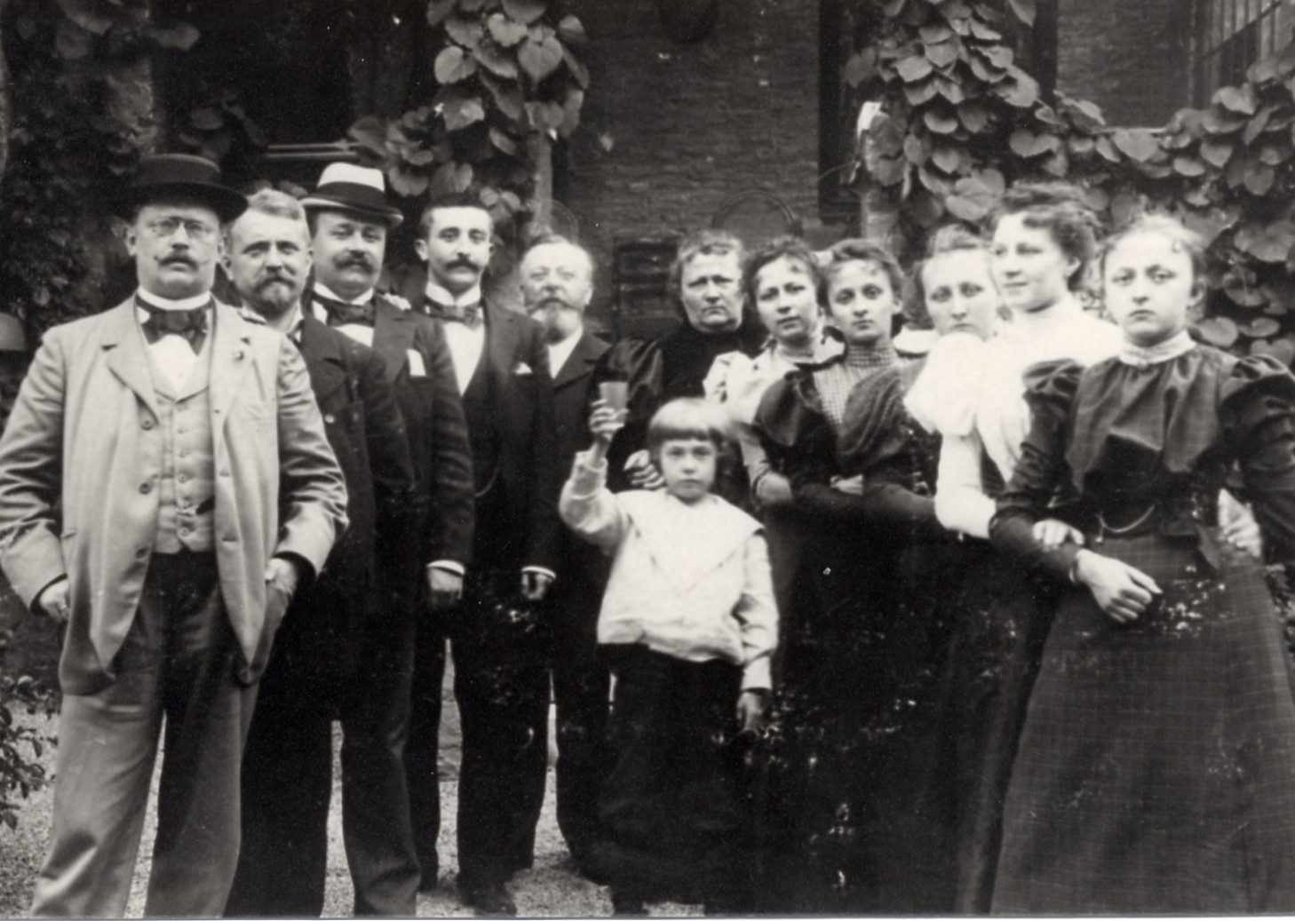 Familie Neuman, Eschweiler 1897